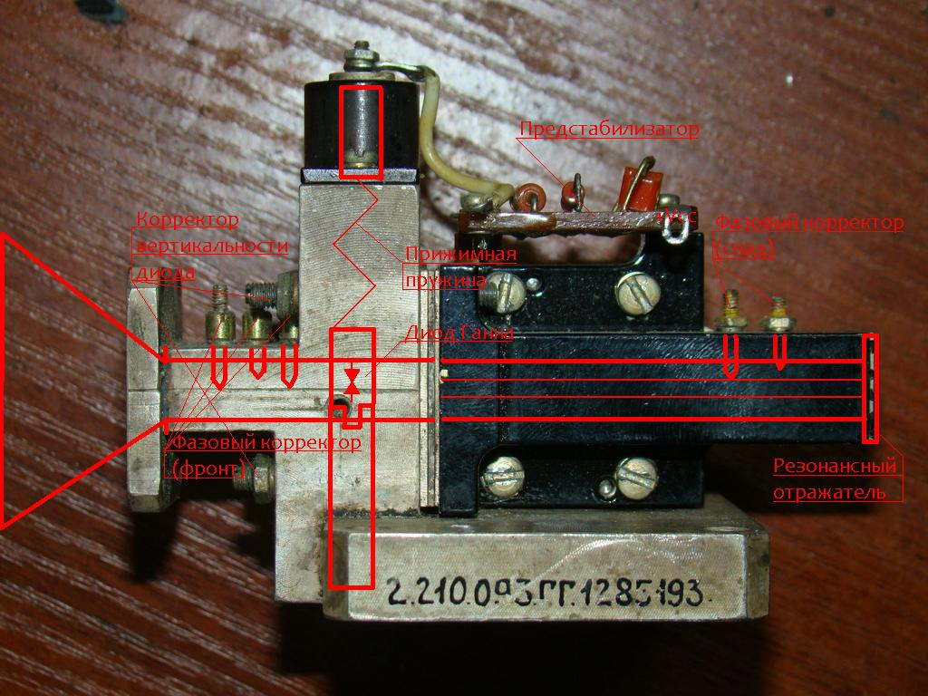 Генератор(гетеродин) на диоде Ганна. МШУ "Обиход".